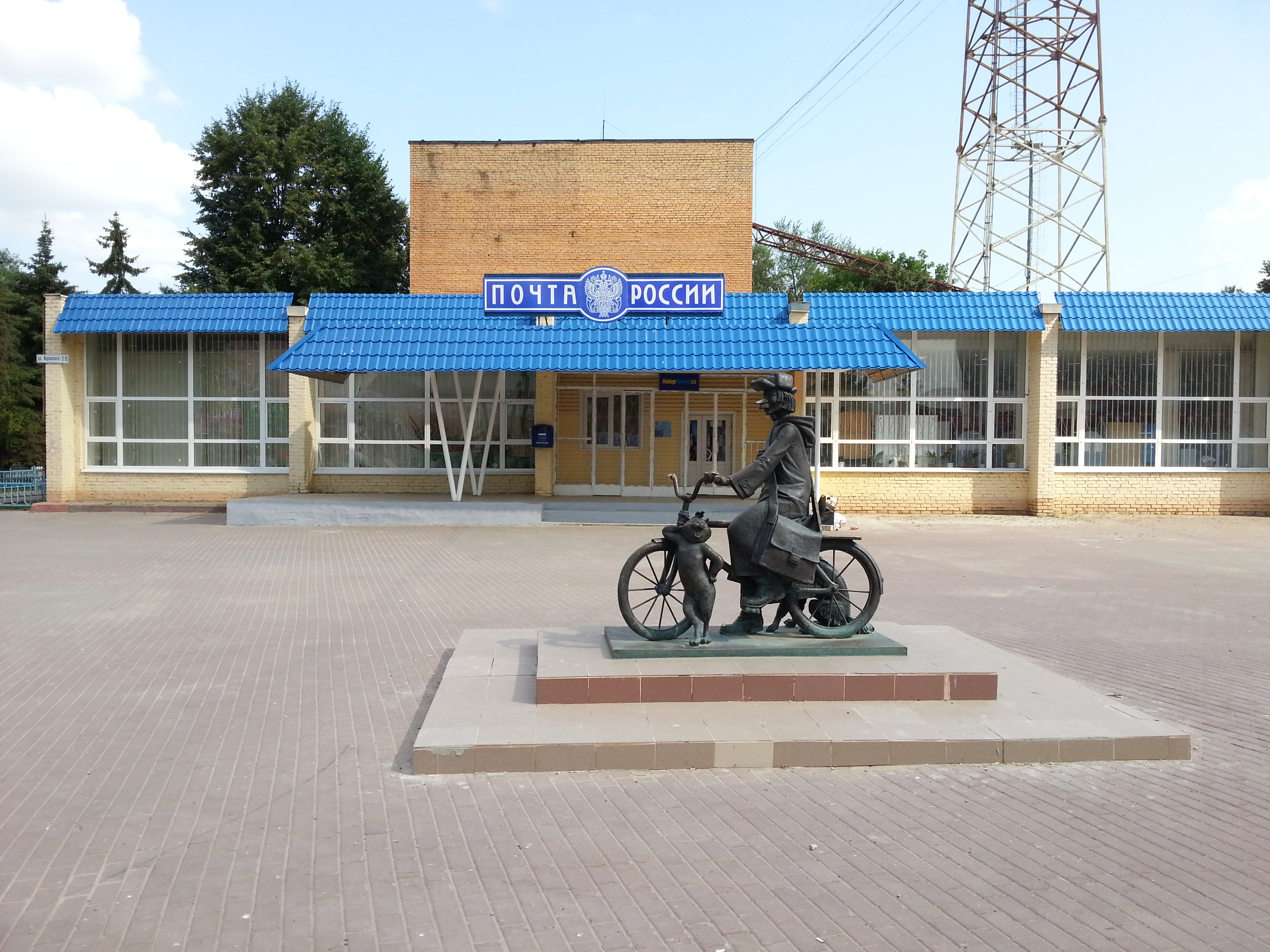 Почтальон Печкин и кот Матроскин в Луховицах, перед отделением почтовой связи